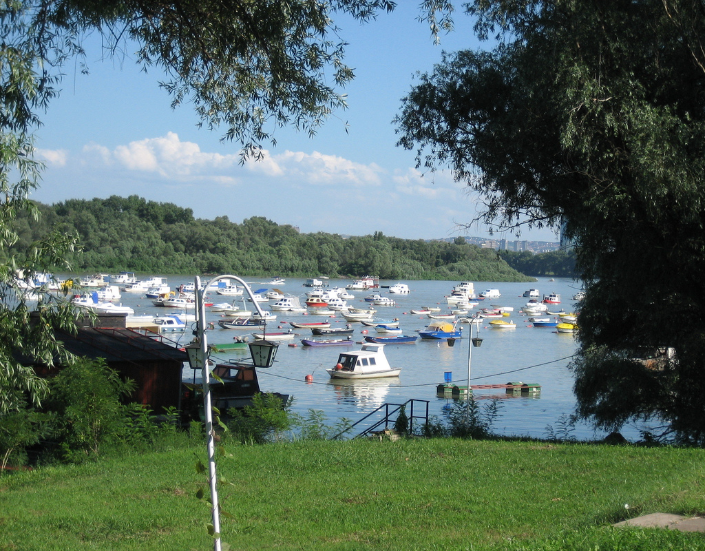 Le Danube